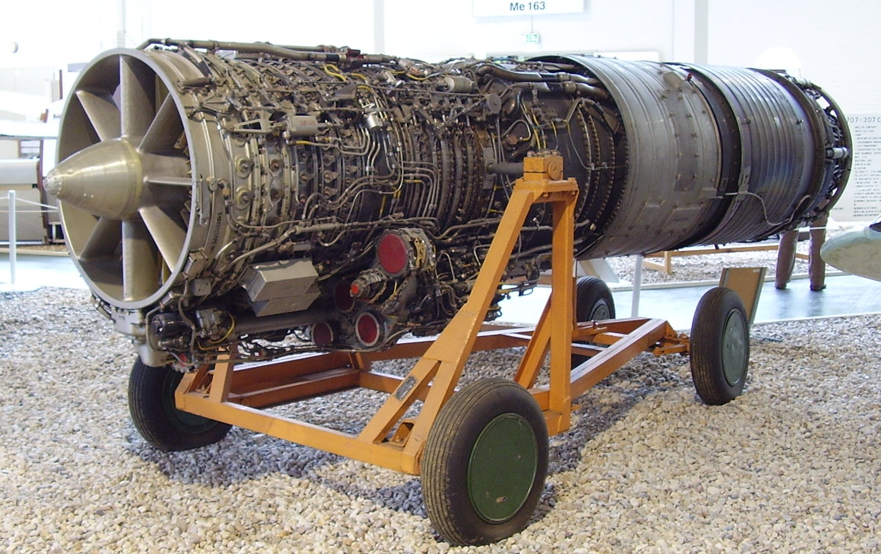 Lyulka AL-21F3 engine, Luftwaffenmuseum der Bundeswehr; Airforce Museum of the Bundeswehr; Berlin-Gatow